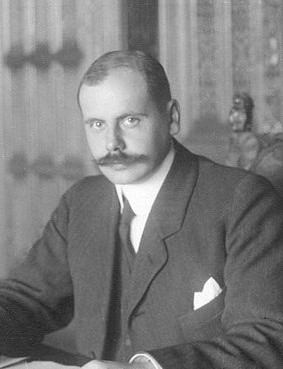 Willem Adriaan Beelaerts van Blokland (1883-1935)